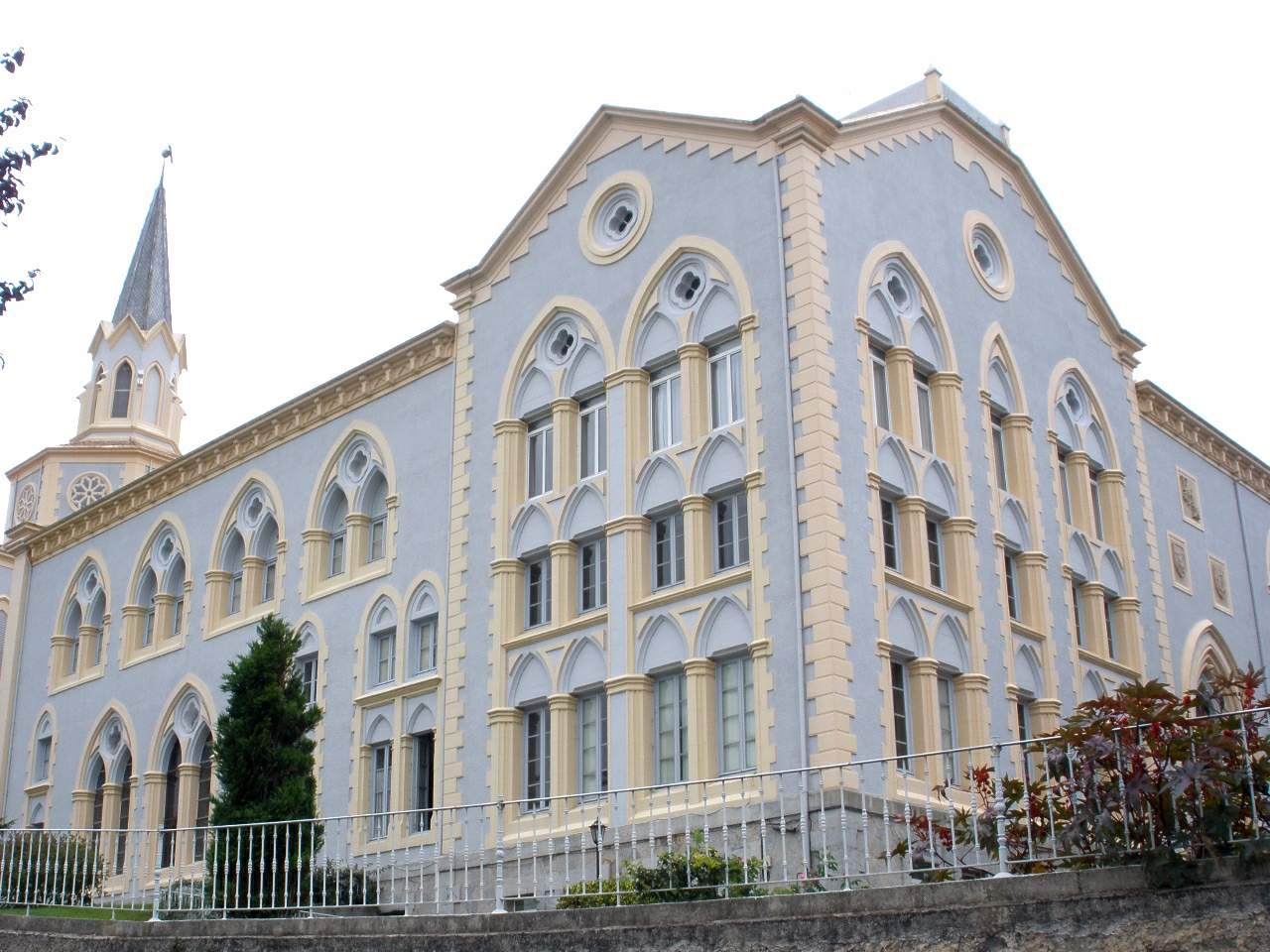 Abadía trapense de Santa María de Viaceli, en Cóbreces (Cantabria)